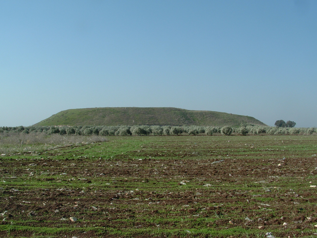 תל כיסאן בעמק זבולון